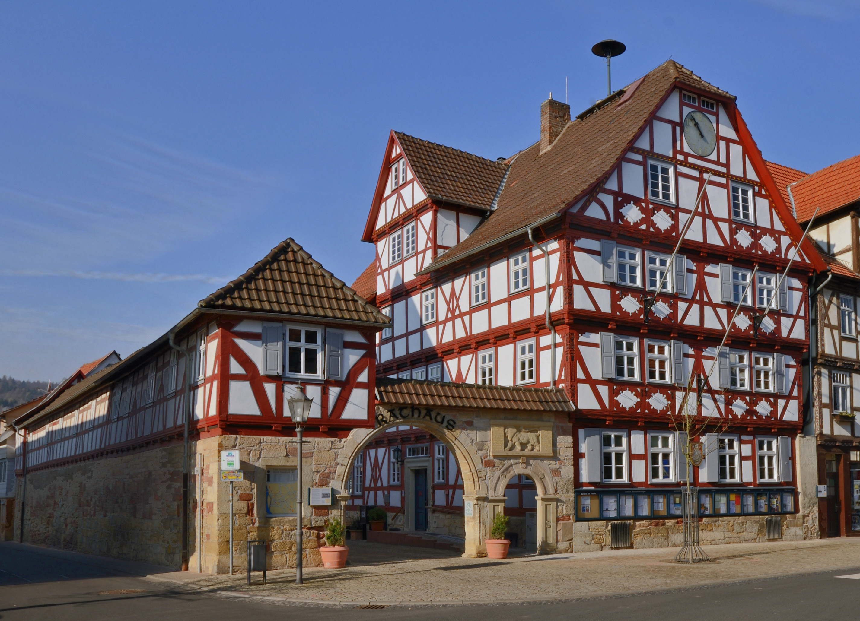 Rathaus Wanfried im März 2010